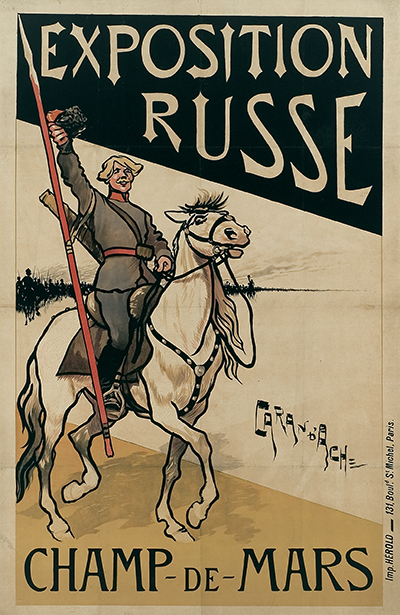 55 Exposition Russe Champ-De-Mars [Paris]. Druck Imp. Herold, Paris. Größe ca. 137,5 x 88,4 cm.